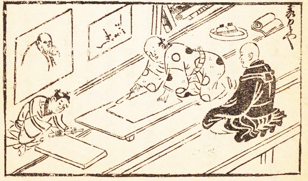 表具屋 增補 江戶惣鹿子名所大全